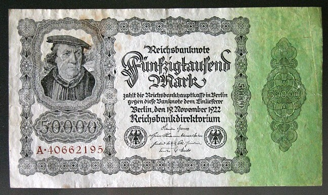 Banknote - 50.000 Mark - Deutsches Reich - 19.11.1922